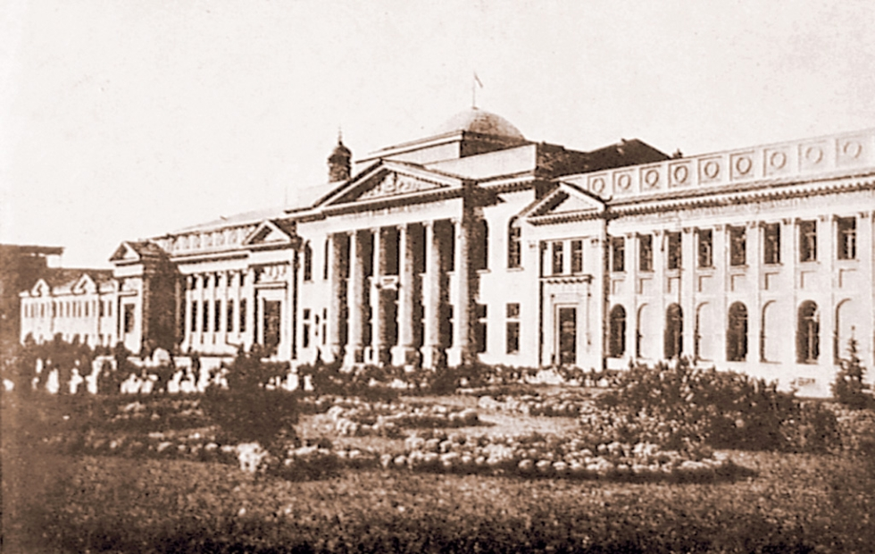 Здание Дворянского собрания и ВУЦИК УССР в Харькове